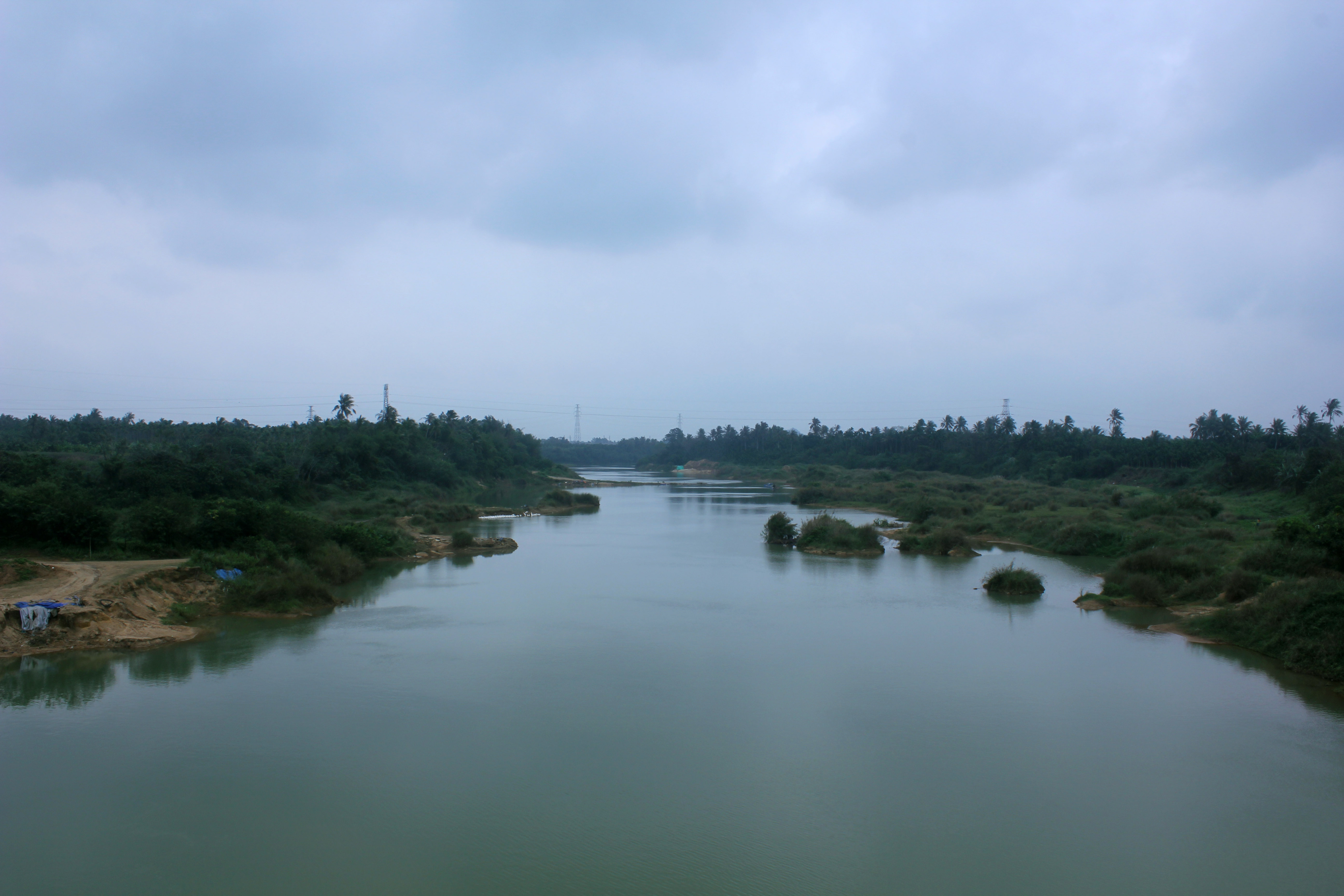 海南省万宁市太阳河，拍摄于环岛高速，面向东。